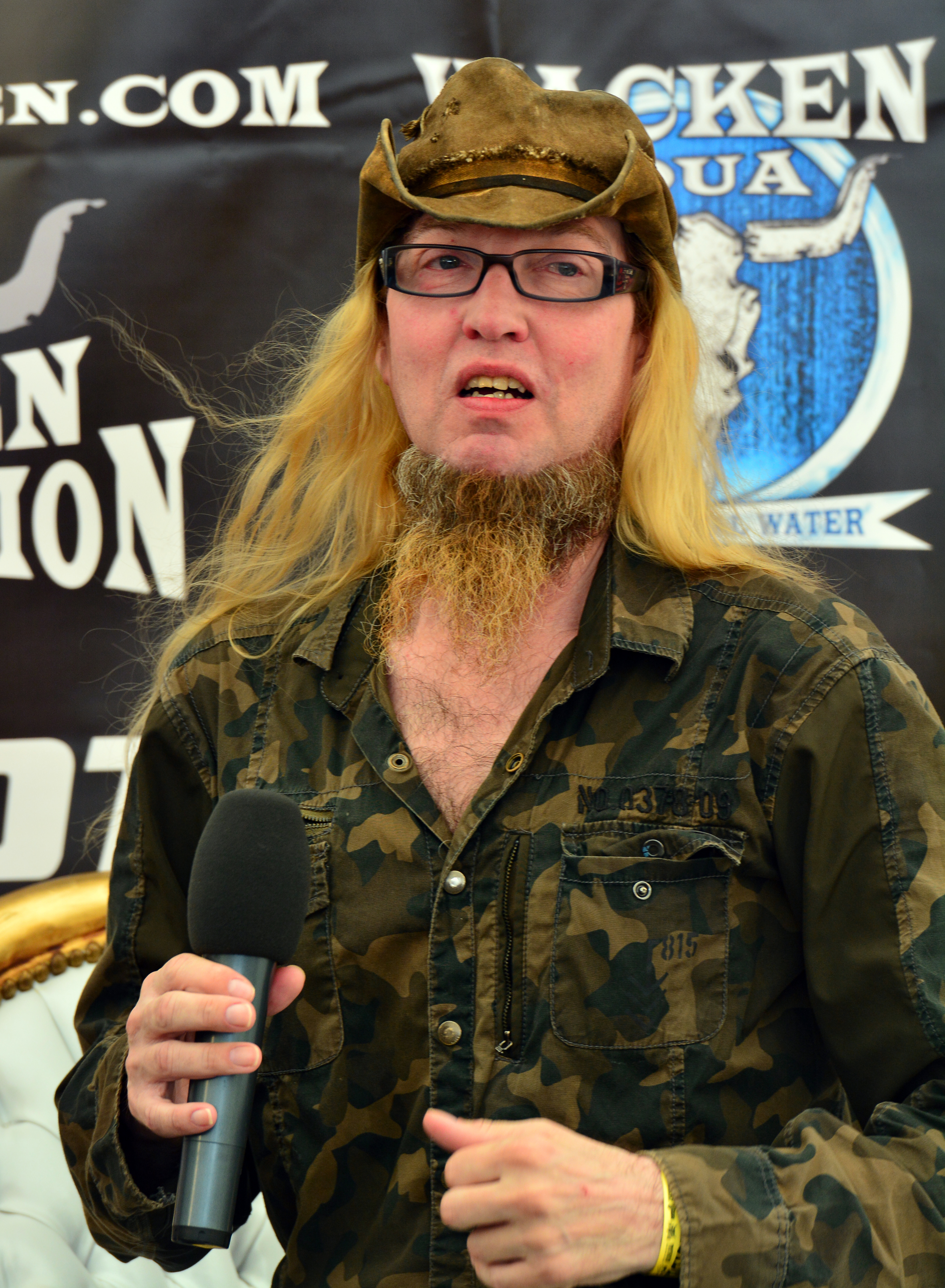 Warrel Dane bei einer Pressekonferenz beim Wacken Open Air 2014